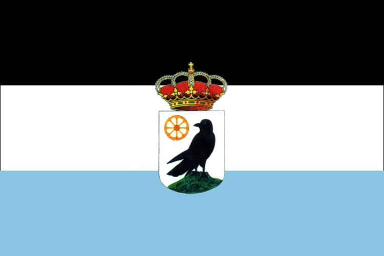 Bandera de El Cuervo de Sevilla